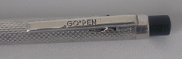 Saját fotó saját tollról